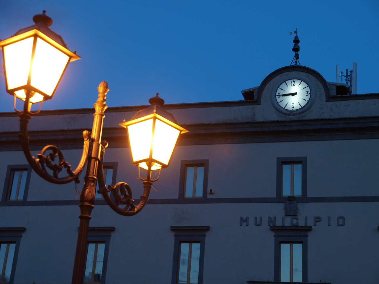 Castel Giorgio, palazzina municipale, dettaglio in notturna con lampione.